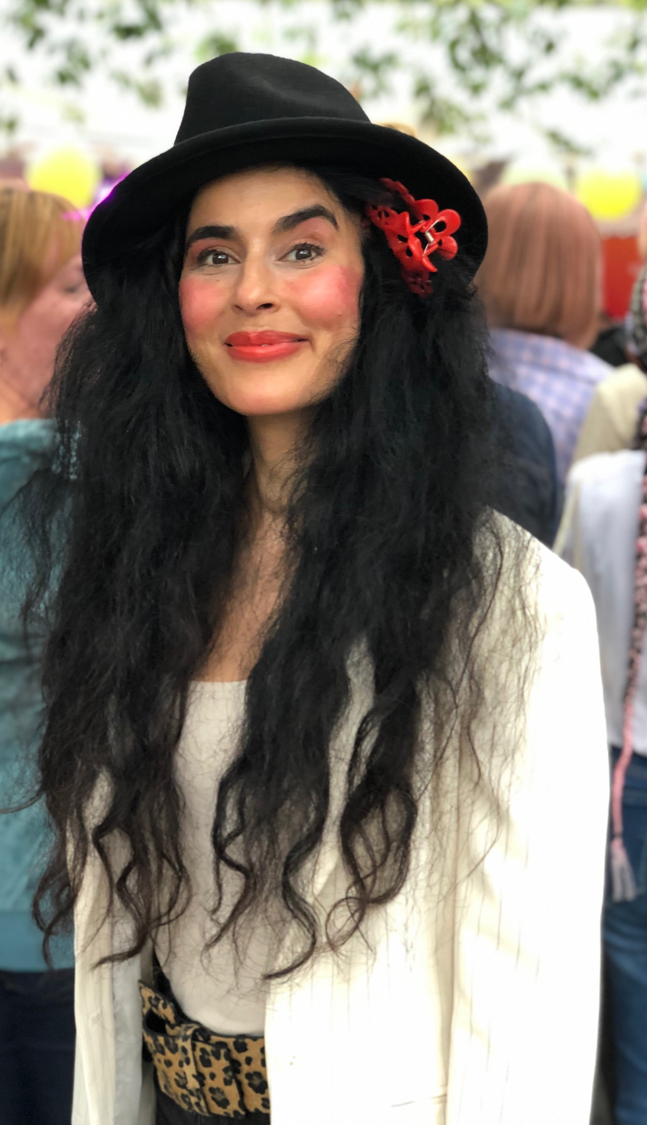 Maloosak, 2019